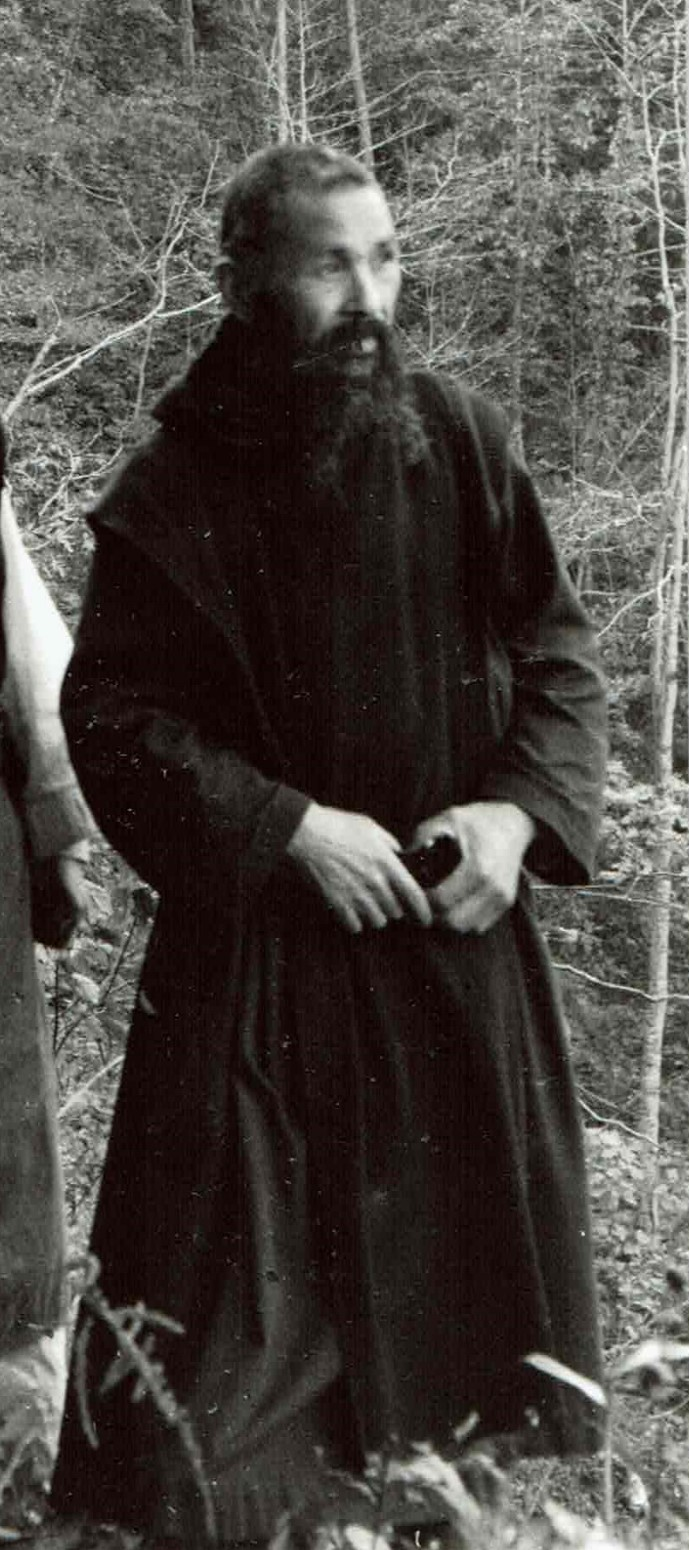 1950年代撮影 撮影地 北海道 助修士（助修道士）